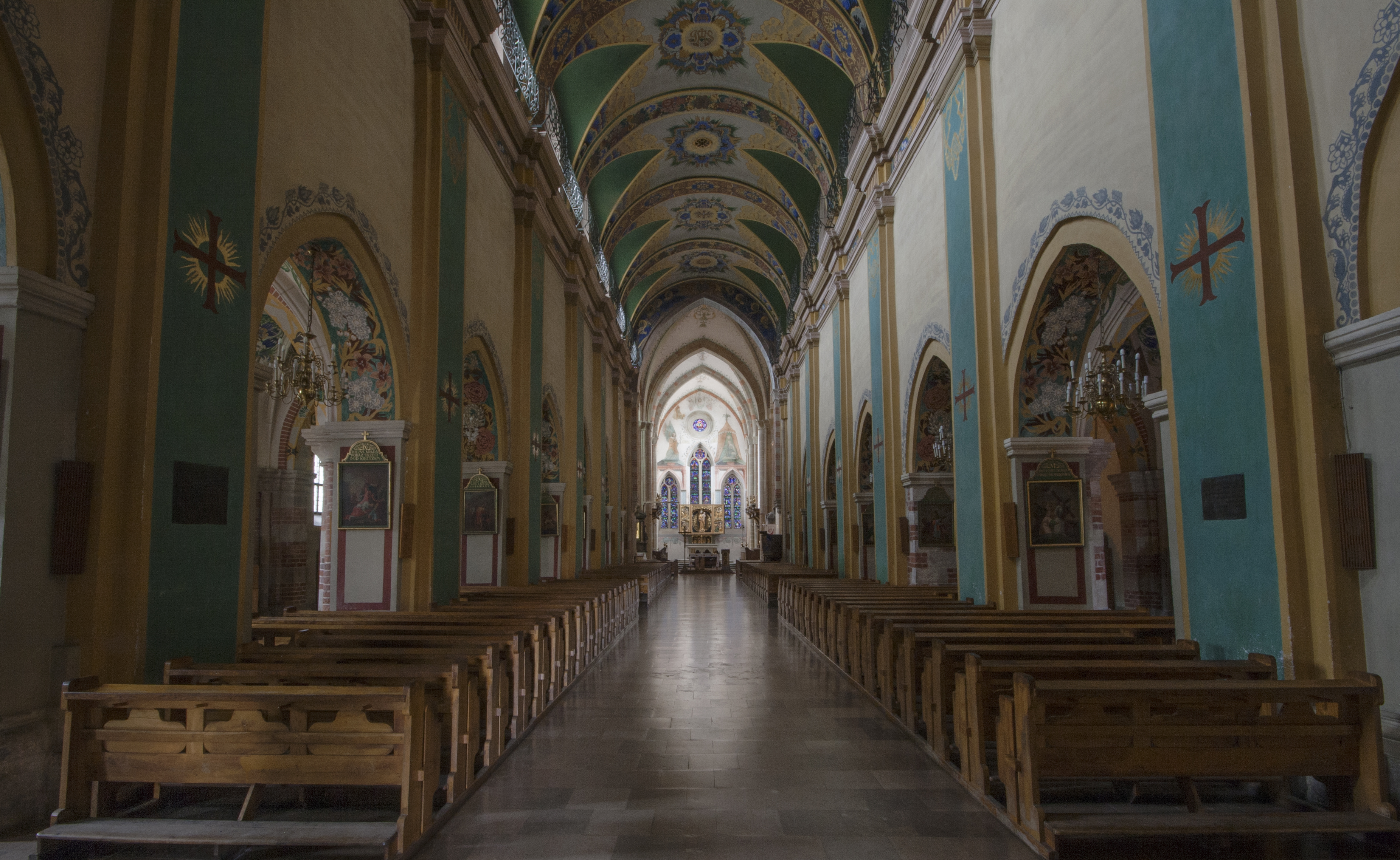 Kraków, kościół p.w. NMP i św. Wacława, 2 ćw. XIII, XVIII